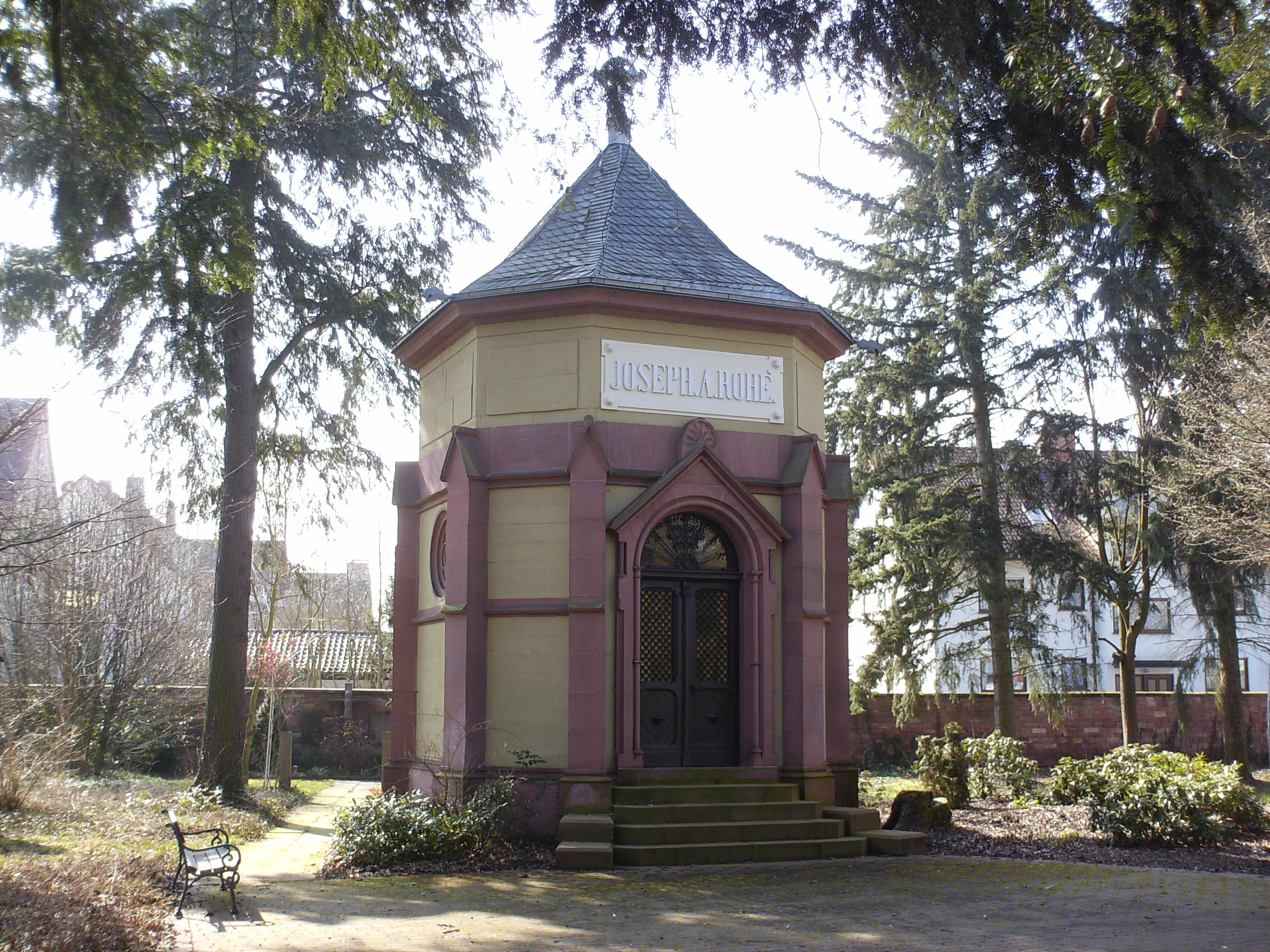 Das Mausoleum Rohes auf dem Stiftungsareal in Kleinwallstadt